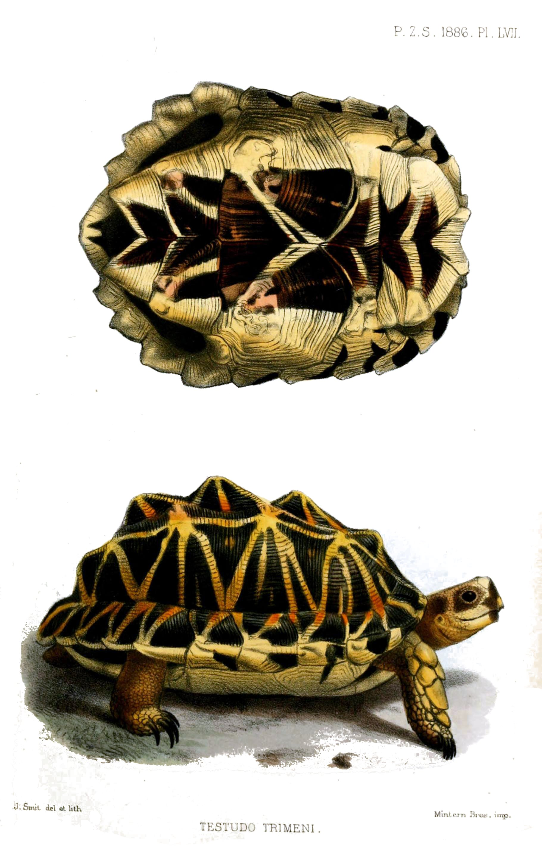 Testudo trimeni = Psammobates tentorius